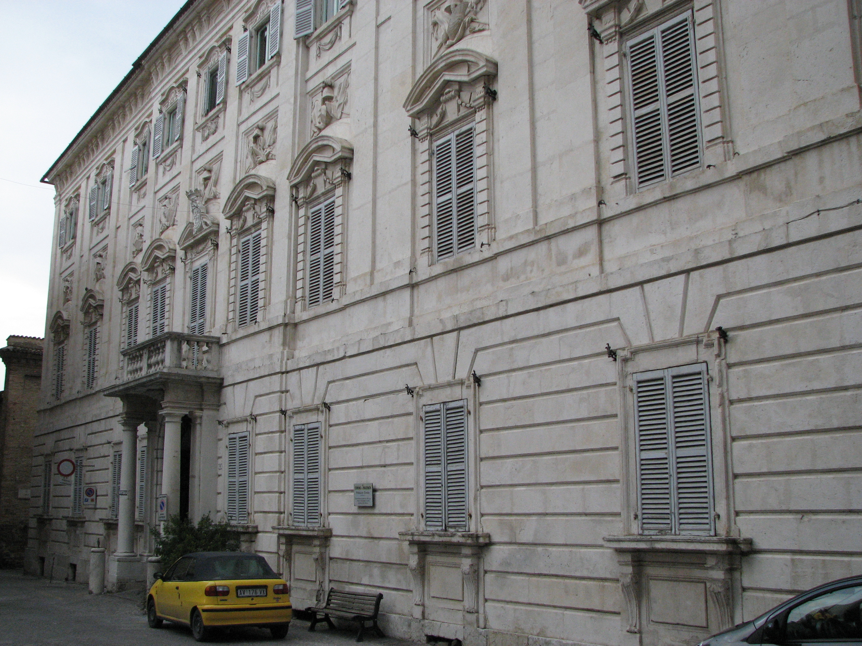 Palazzo Costa, Macerata, Italy, XVIII c.